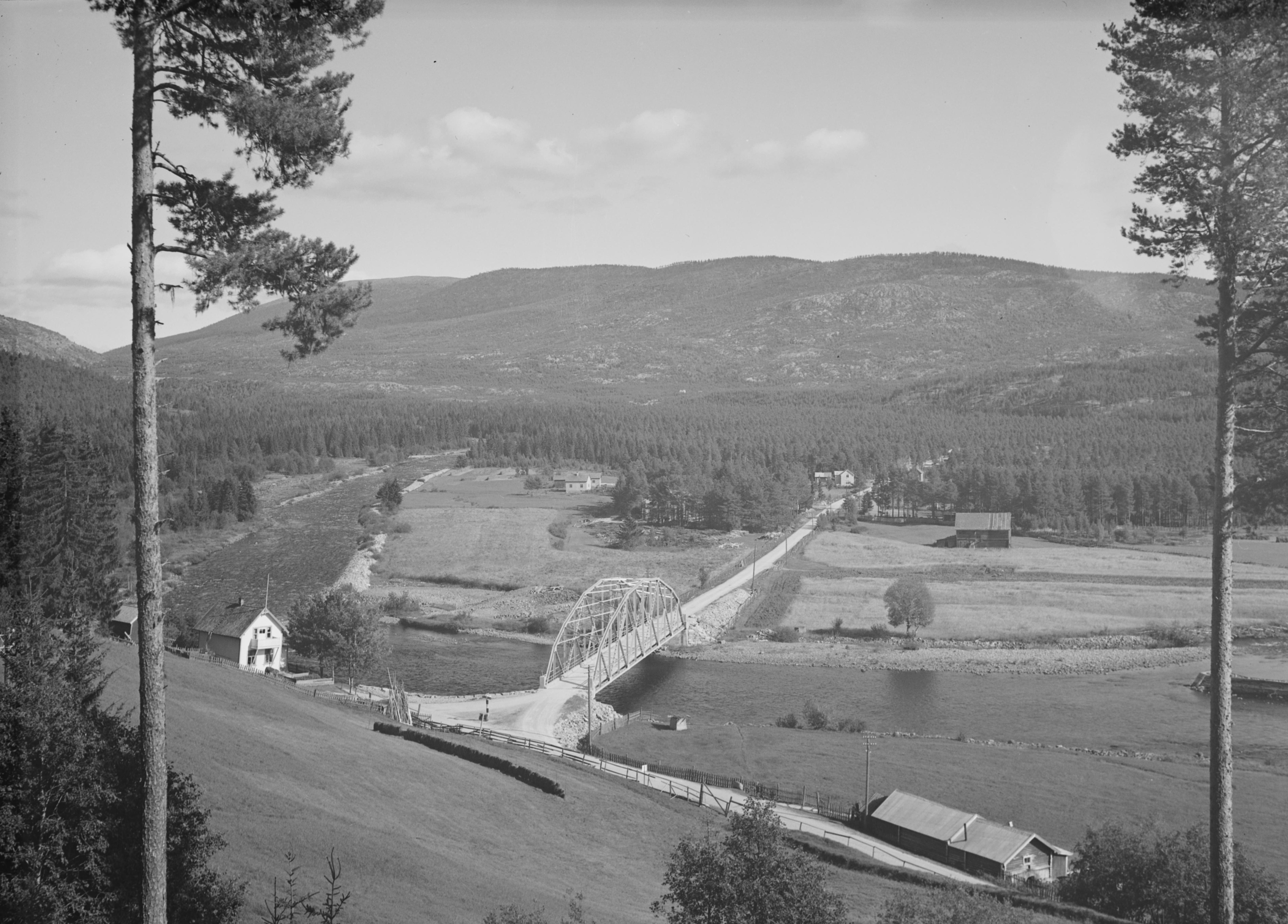 Bildet er hentet fra Nasjonalbibliotekets bildesamling. Anmerkninger til bildet var: Fotograf : ukjent Rendalen,Åkrestrømmen, Rendalen, Hedmark